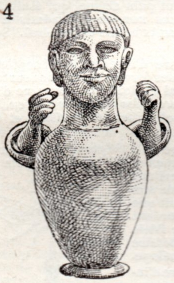 Canope étrusque (musée de Florence) - gravure tiré du Larousse pour tous en deux volumes publié vers 1910 - volume 1 (A-K), page 619 - planche "Art étrusque".